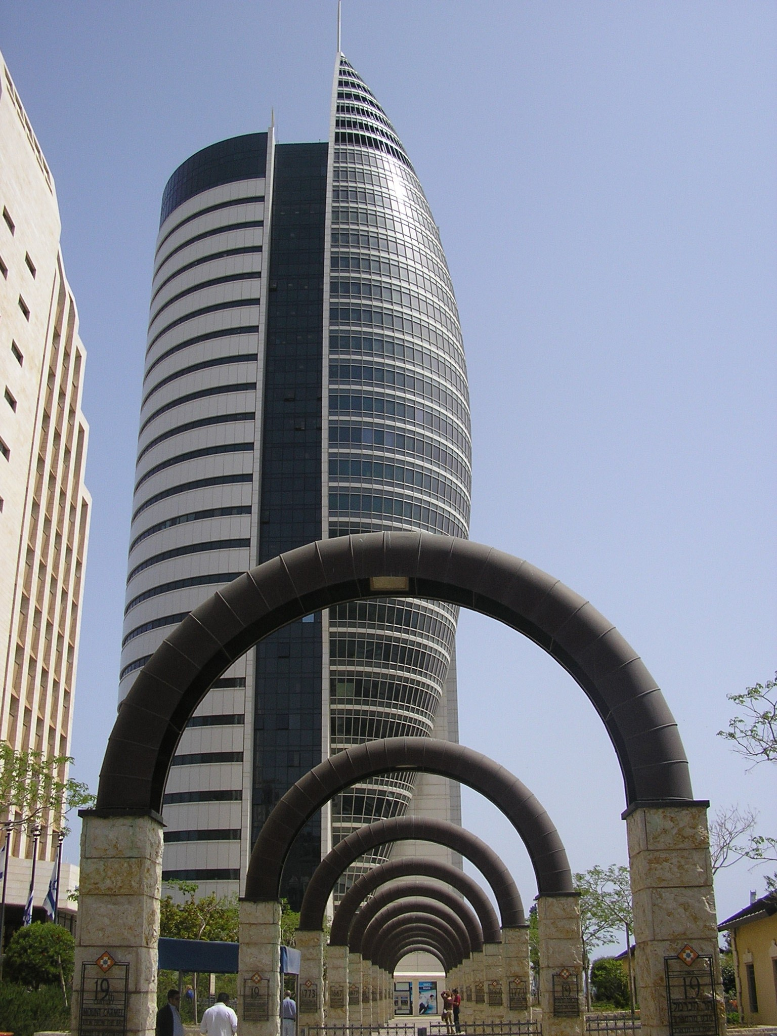 "Sail" (or "Rocket") building in Haifa, Israel. מגדל ה"מפרש" או "הטיל" בחיפה, ישראל. מכונה גם "בניין ב' בקריית הממשלה על שם יצחק רבין".